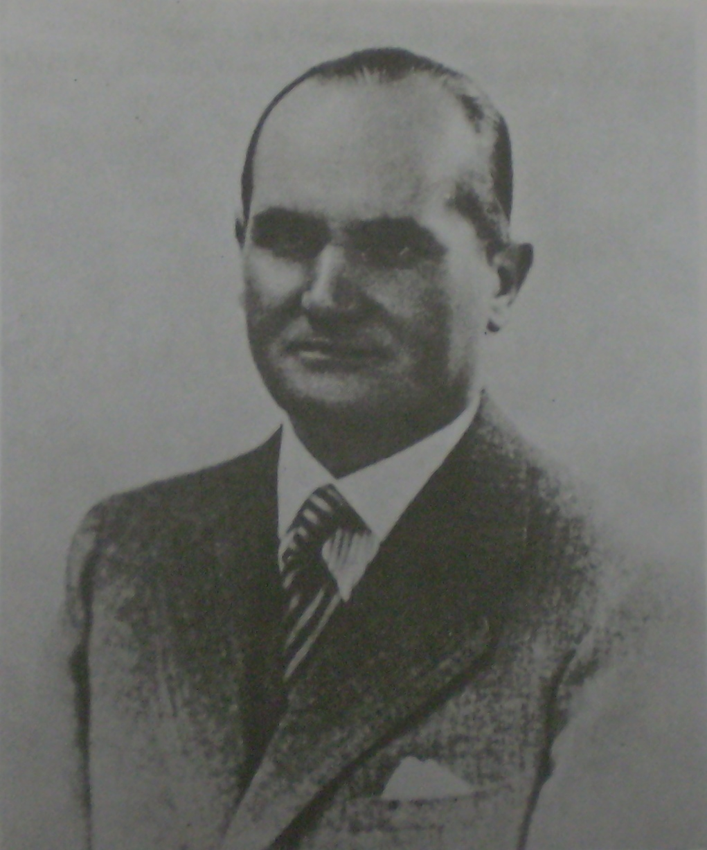 Ludovico Ivanissevich